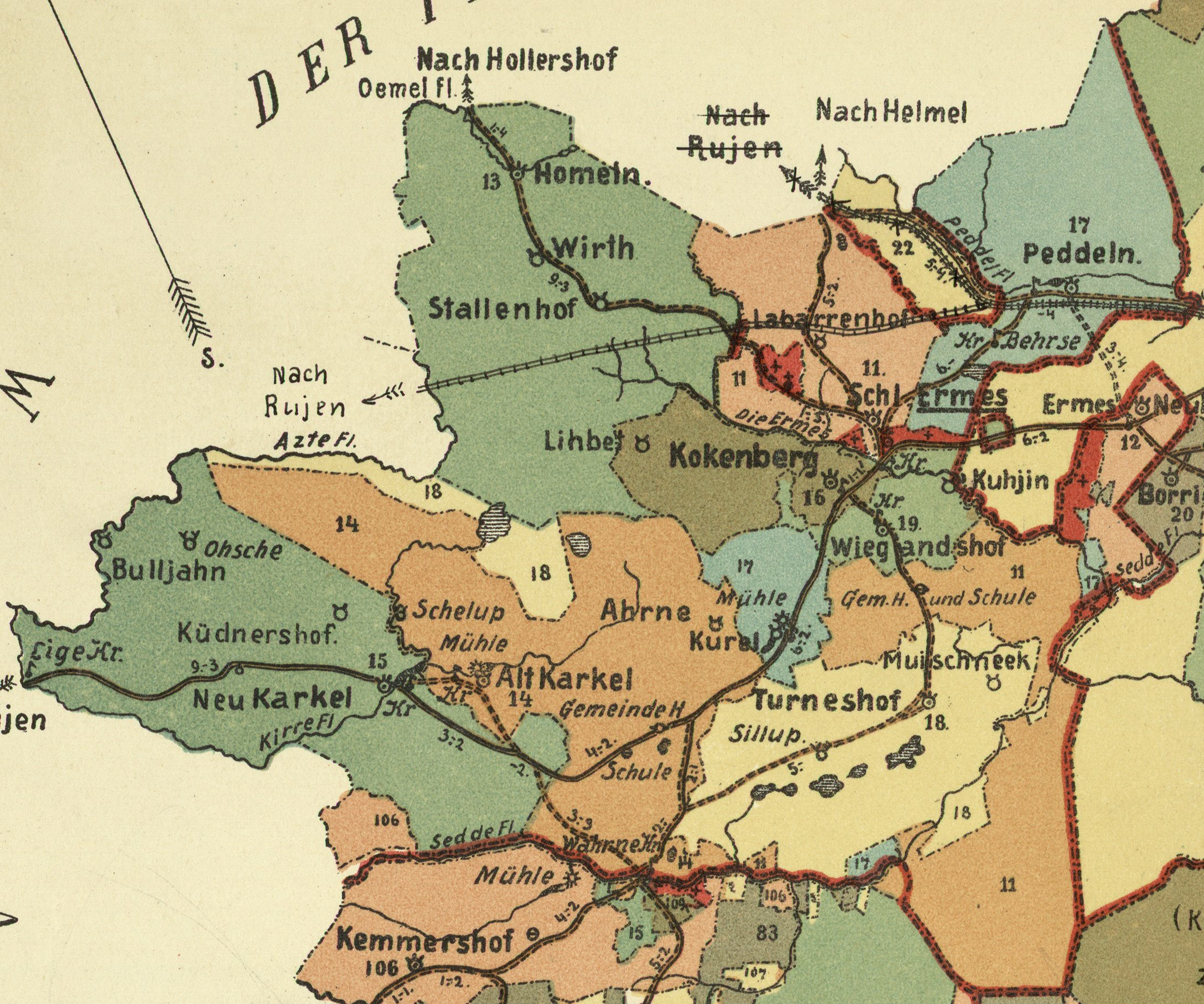 Härgmäe kihelkonna mõisad 1904. aasta kaardil.